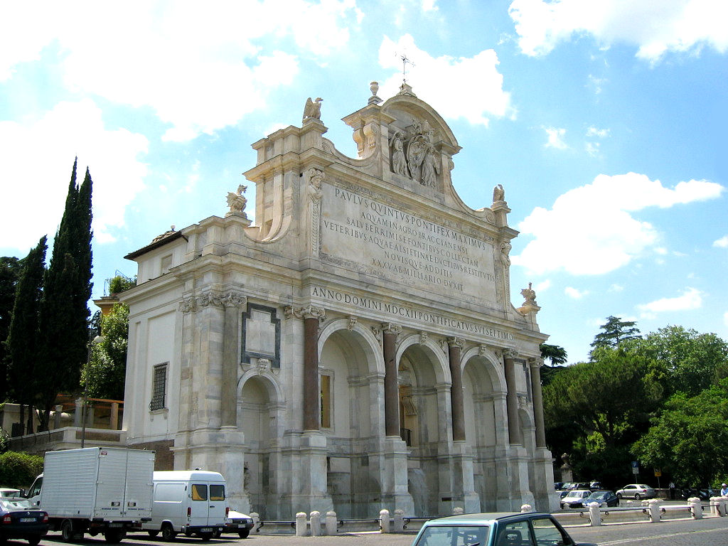 Fontana dell'Acqua Paola, Gianicolo, Roma. Picture by Torvindus. 1860s Today.